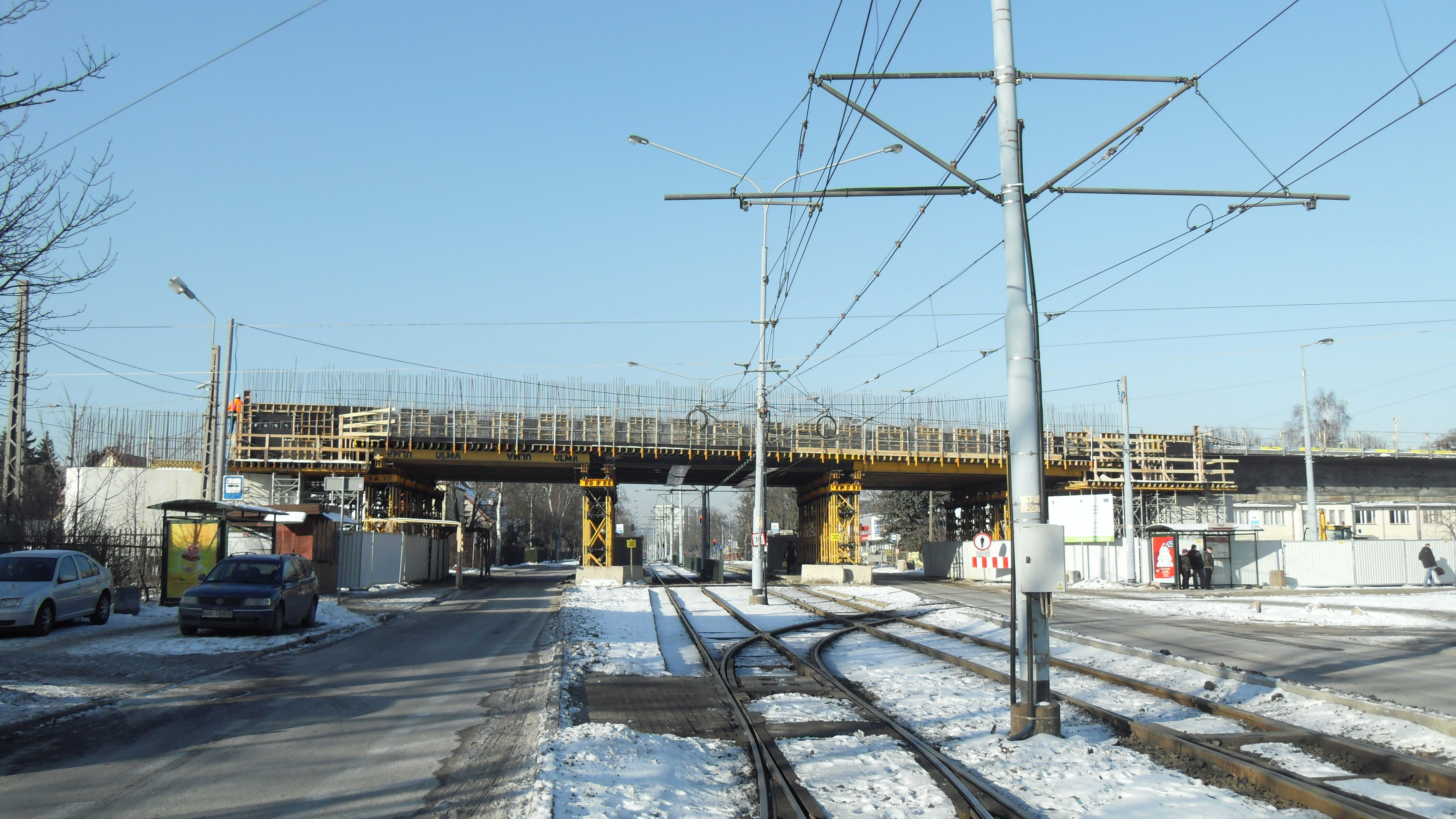 Gdańsk Strzyża, ul. Wita Stwosza. Pomorska Kolej Metropolitalna w budowie.